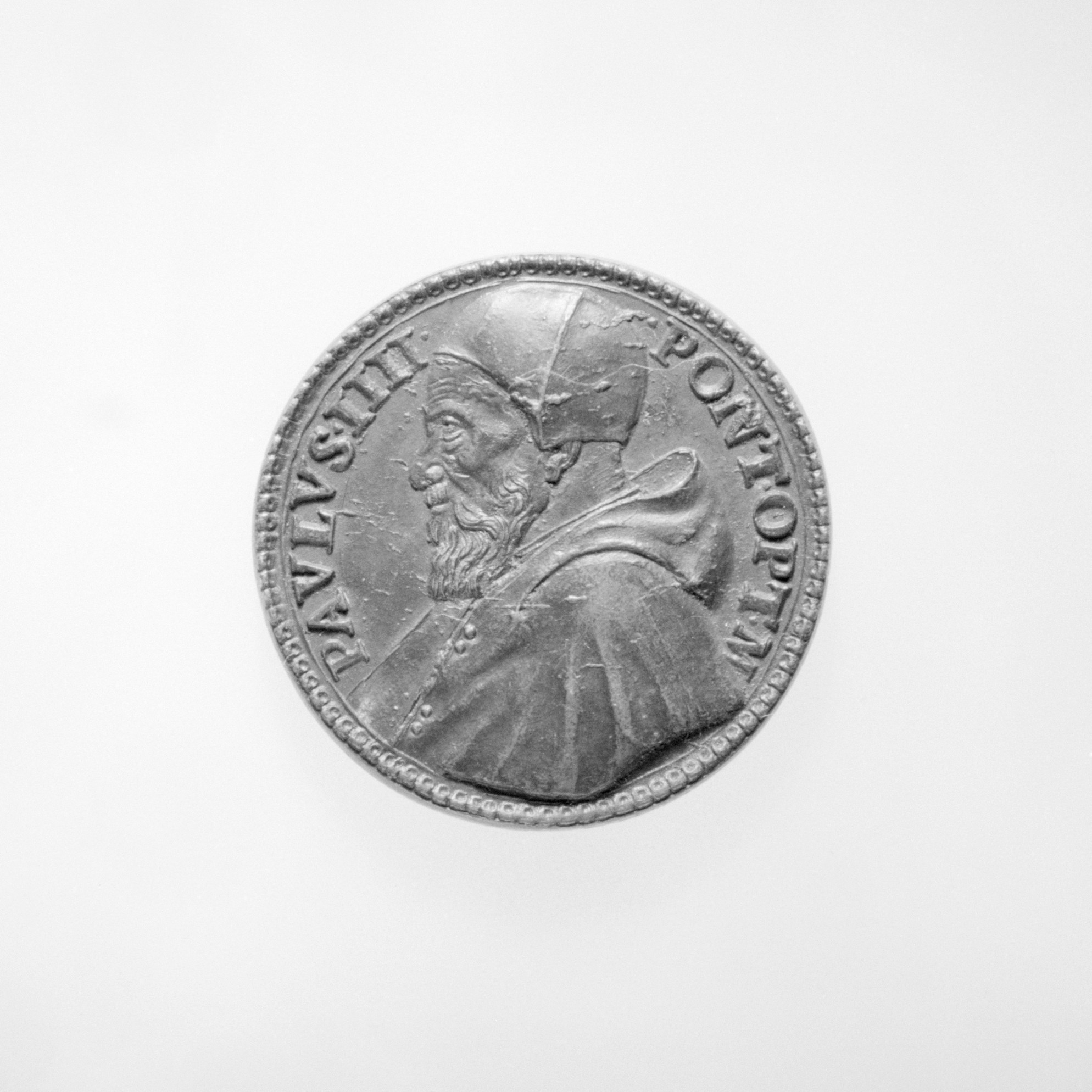 Italian; Medal; Medals and Plaquettes